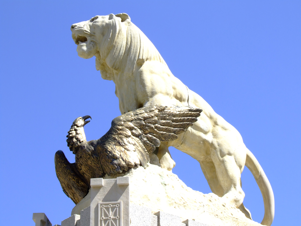 Monumento de Santocildes, ciudad de Astorga, Maragatería, León, País Leonés.